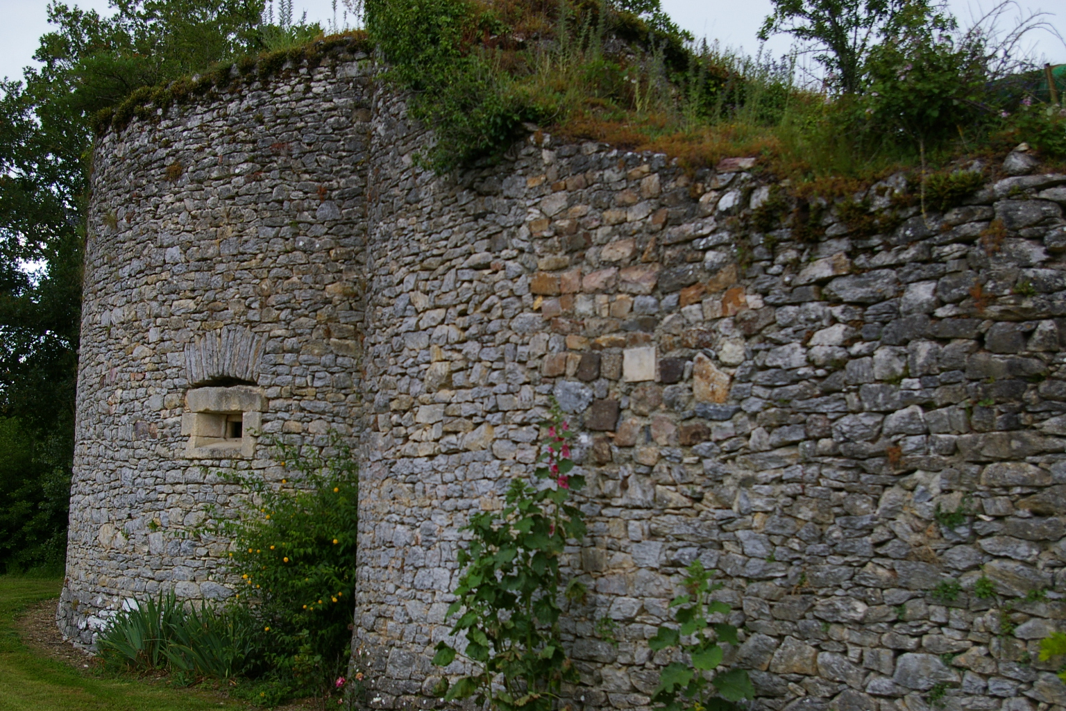 Château de Bouillé - Torcé-Viviers-en-Charnie (53)